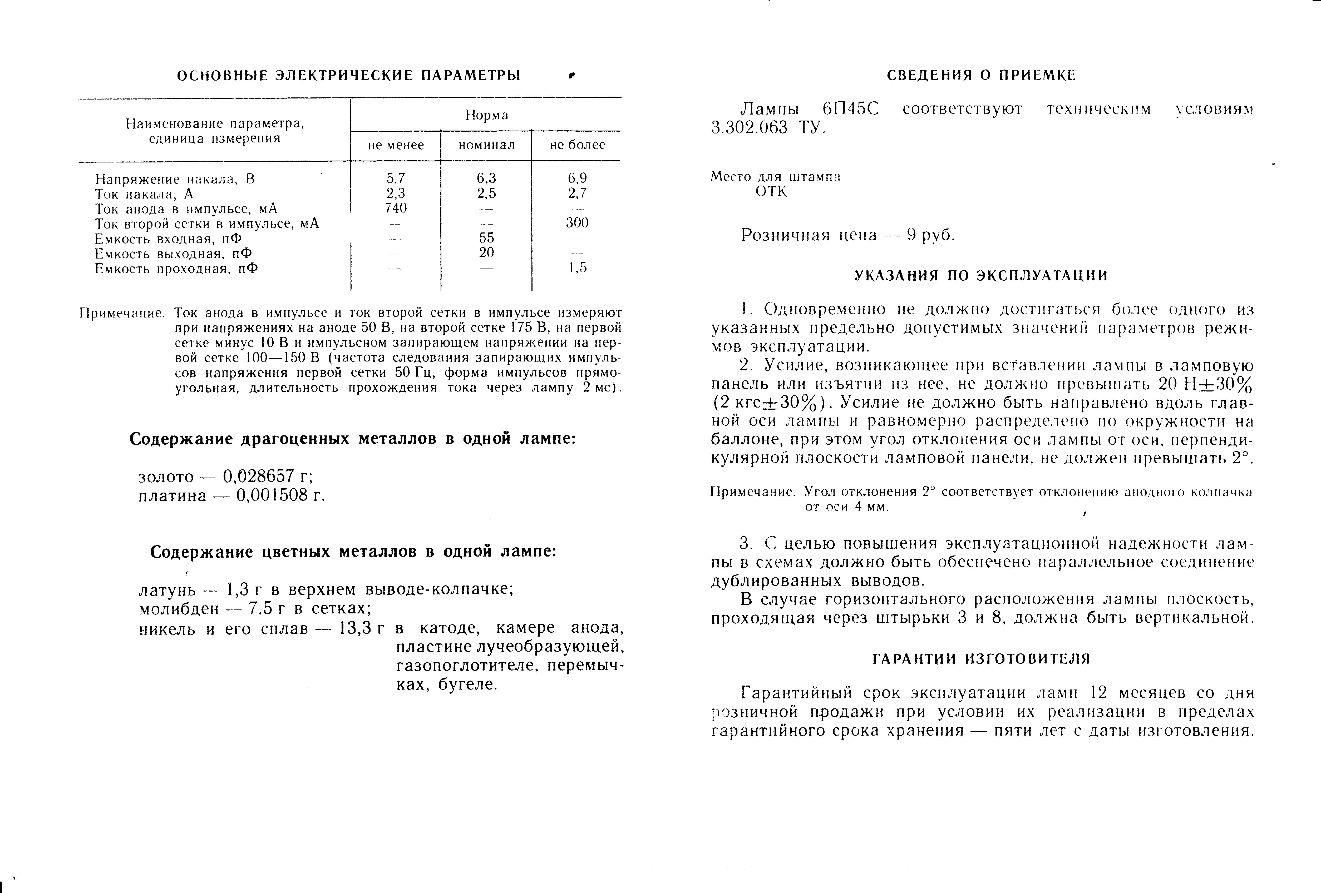 Лампа 6П45С Этикетка